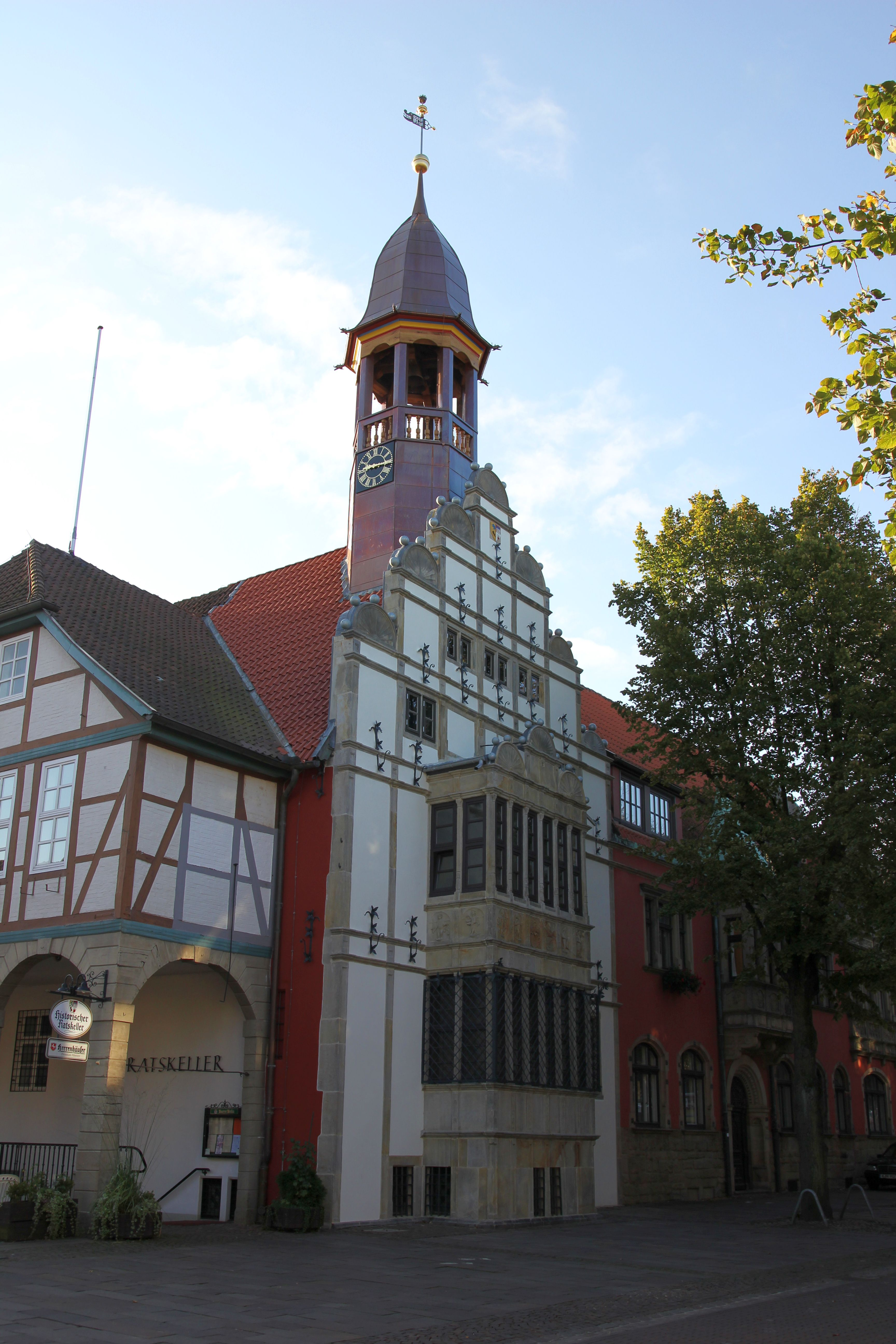 Der sanierte Rathausgiebel des Rathauses mit neuem Turm und Turmhaube